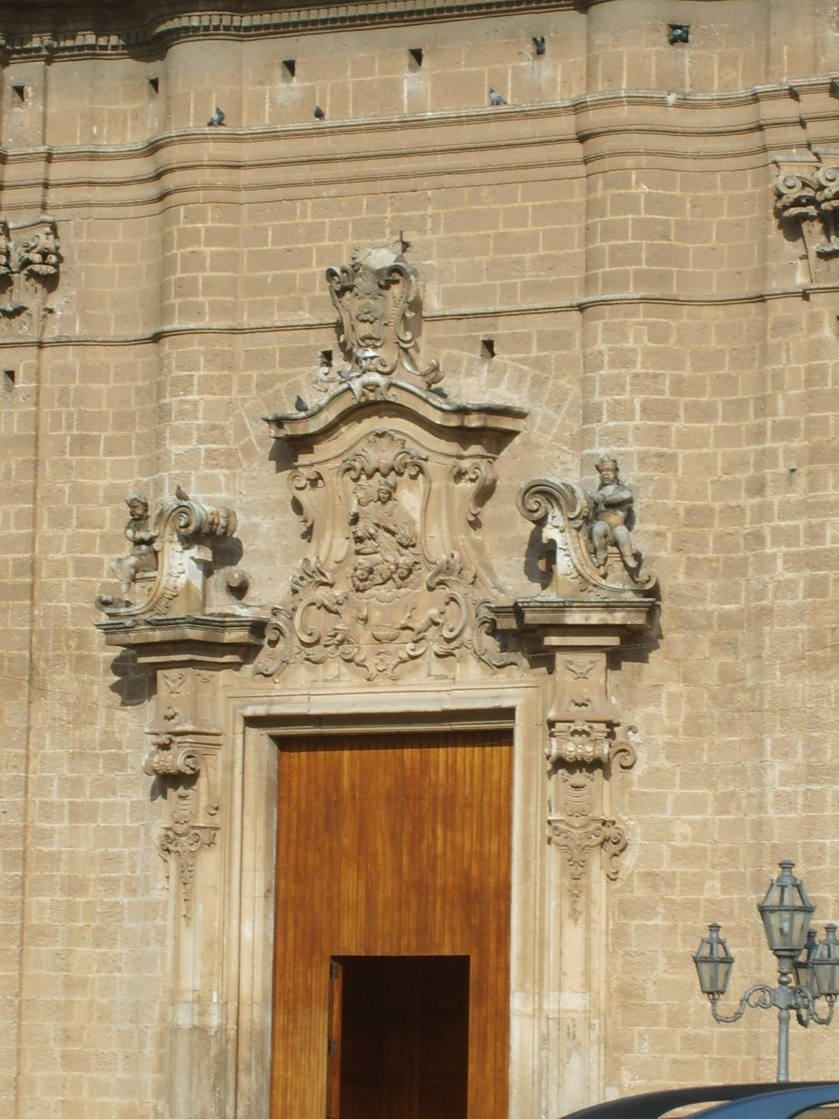 Portone centrale della Chiesa Matrice